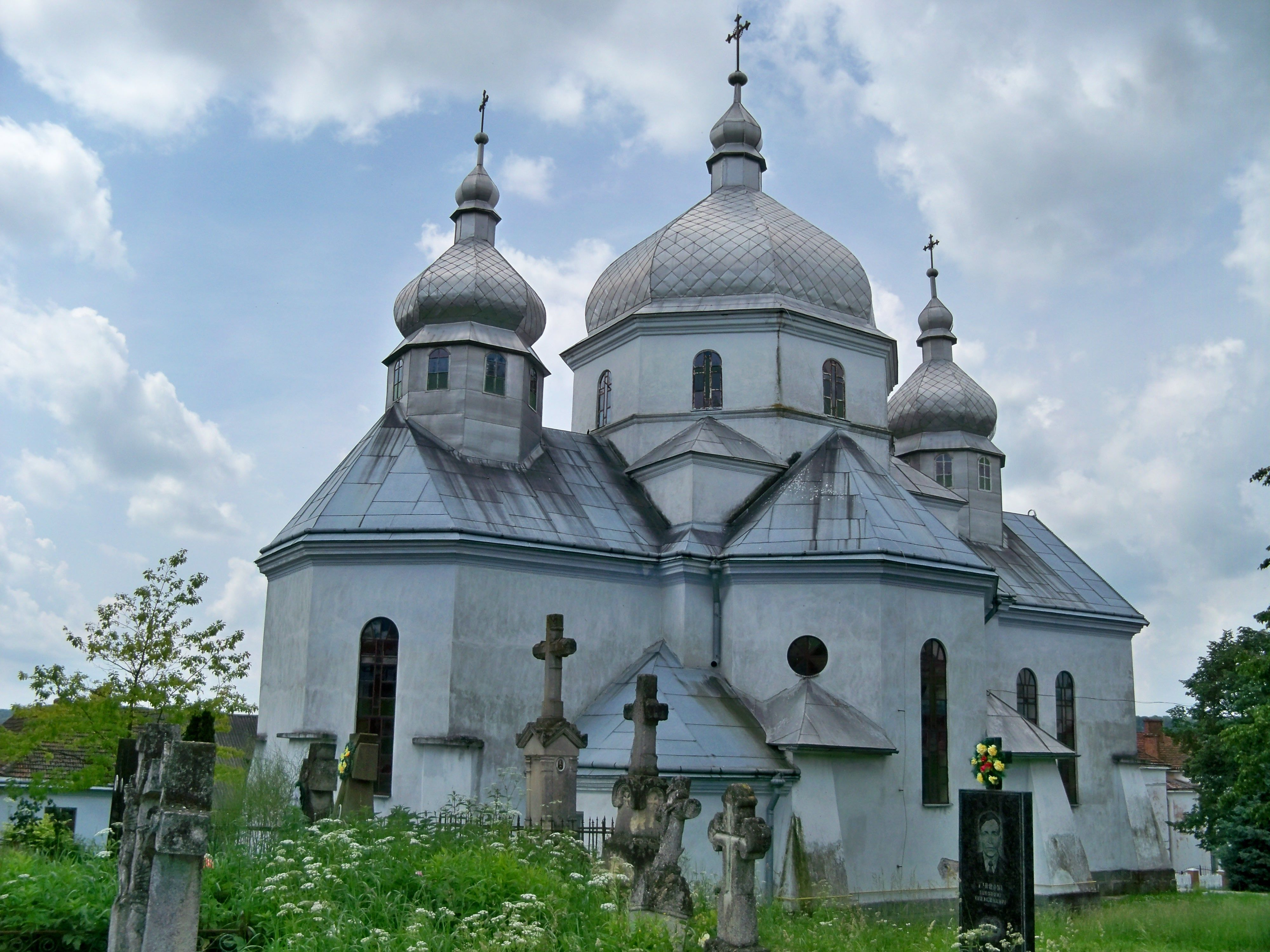 Церква св. Петра і Павла (мур.), село Урмань